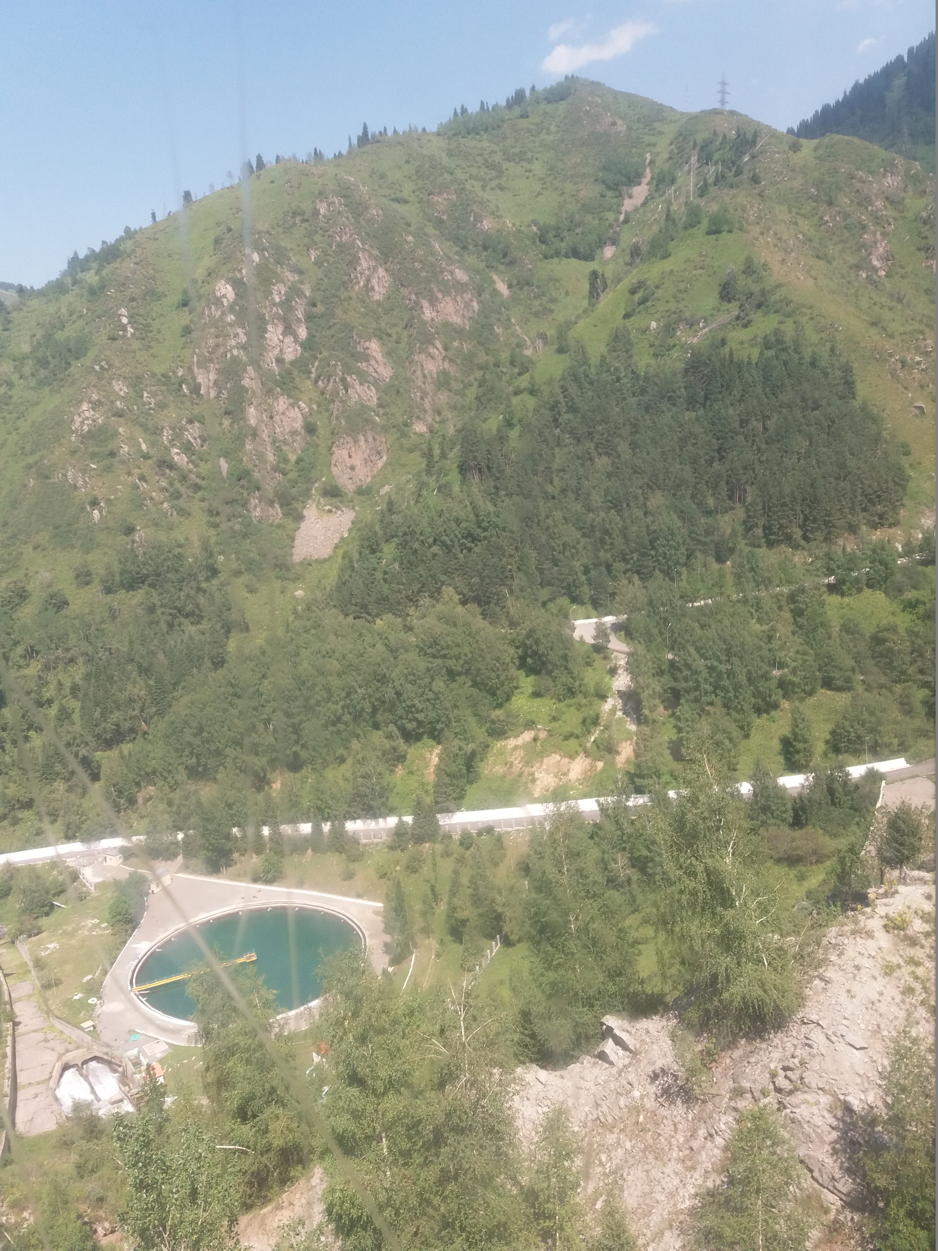 Қазақша (кирил): Алматы Шымбұлақ